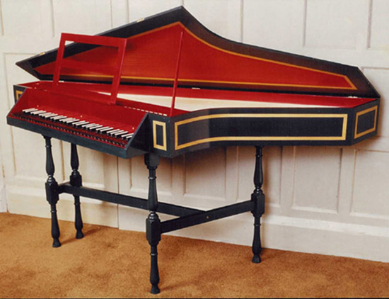 اسپینت